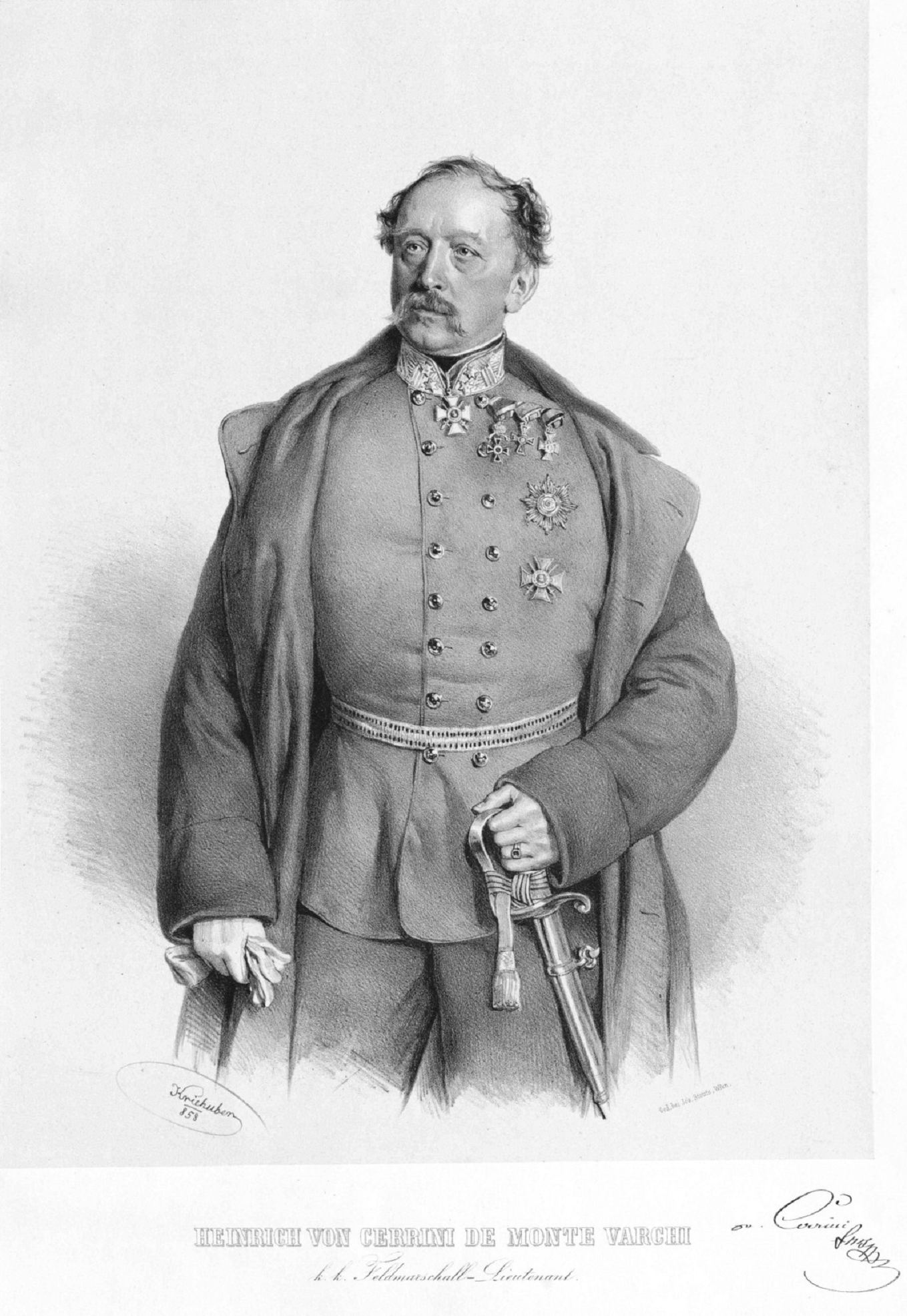 Heinrich Cerrini de Monte Varchi (1801–1870), Feldmarschalleutnant, Lithographie von Josef Kriehuber, 1858